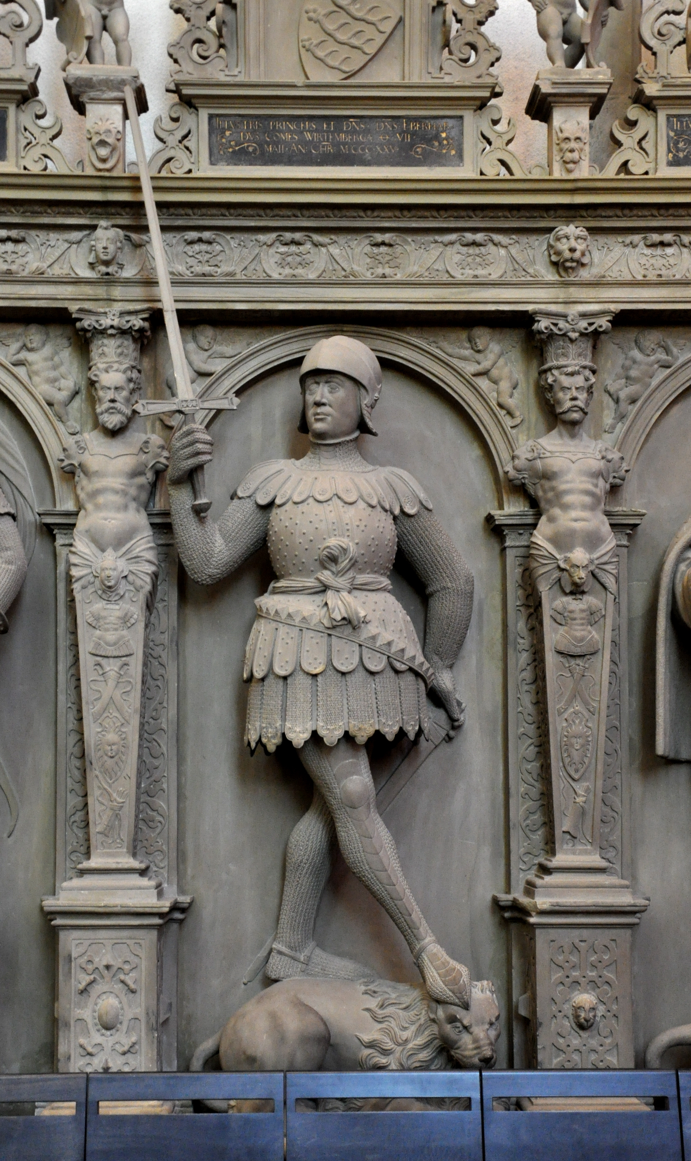 Stuttgart, Chor der Stiftskirche, Grafenstandbilder von Sem Schlör (ab 1576 entstanden zum Ersatz der ursprünglichen Epitaphe der in der Stiftskirche beigesetzten Grafen von Württemberg) Figur 3: Eberhard I. der Erlauchte († 1325)